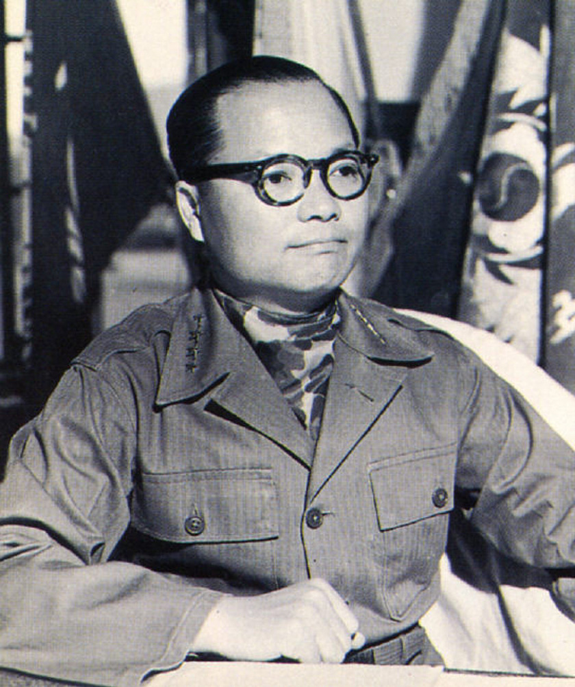 Lee Hyung-geun